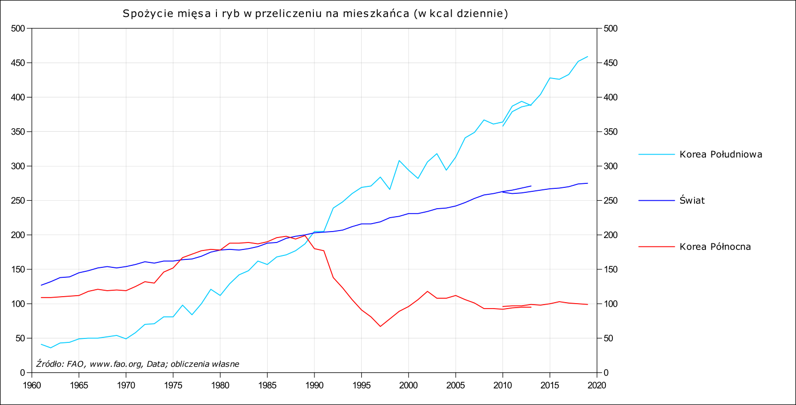 Spożycie mięsa i ryb w Korei Południowej i Północnej (w kcal dziennie) Źródło: Organizacja Narodów Zjednoczonych do spraw Wyżywienia i Rolnictwa (FAO)